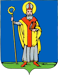 Herb miasteczka Uścieczko